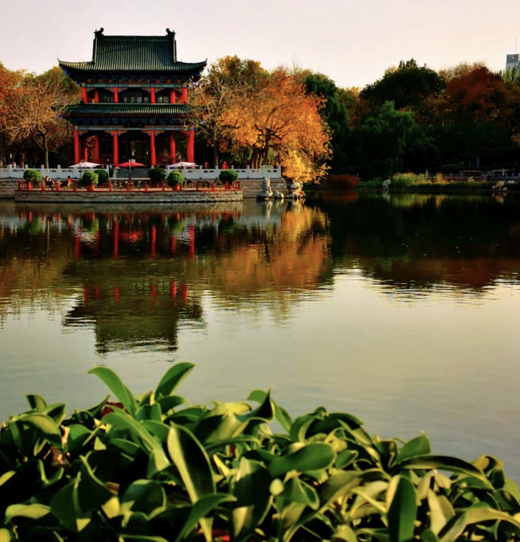 乌鲁木齐人民公园湖心亭与鉴湖